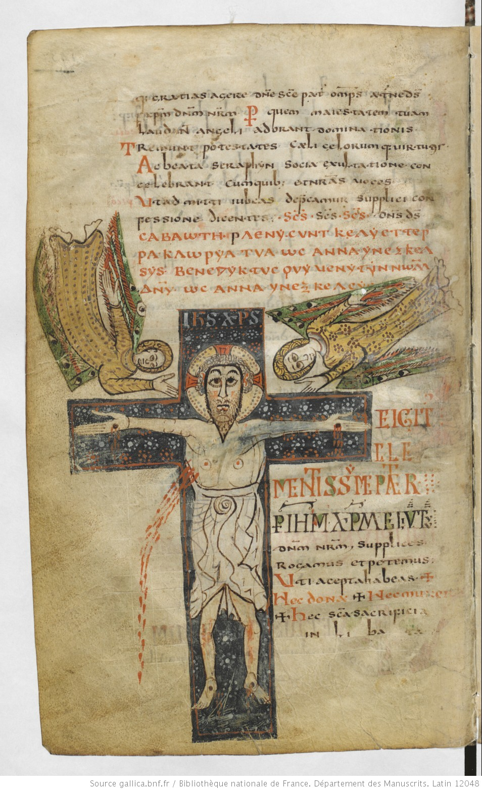 Распятие Христа на миниатюре из Геллонского сакраментария